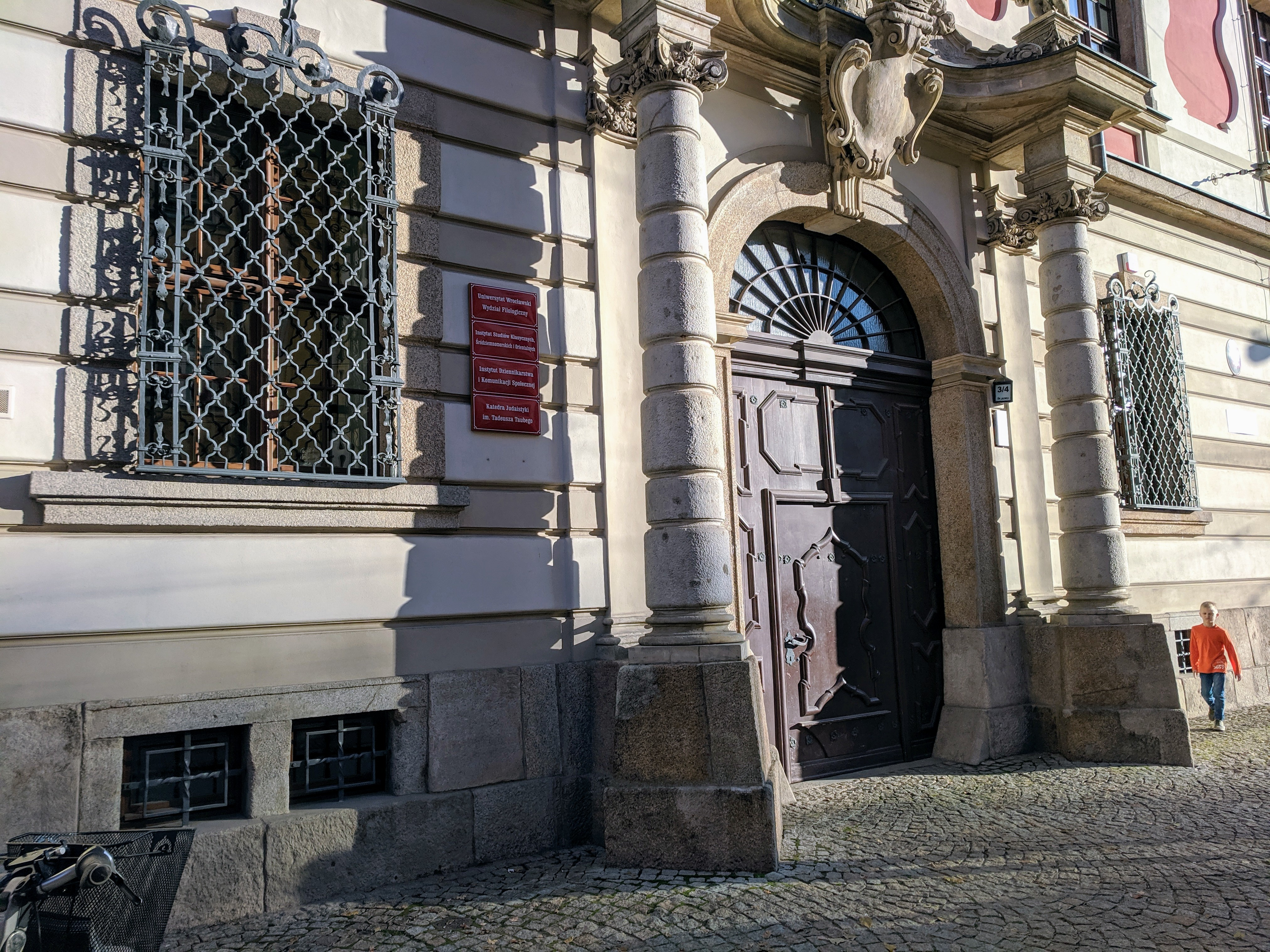 ulica św. Jadwigi 3/4 we Wrocławiu, dawna Biblioteka Uniwersytecka, obecnie budynek Wydziału Filologicznego (Instytut Studiów Klasycznych, Śródziemnomorskich i Orientalnych, Instytut Dziennikarstwa i Komunikacji Społecznej oraz Katedra Judaistyki)